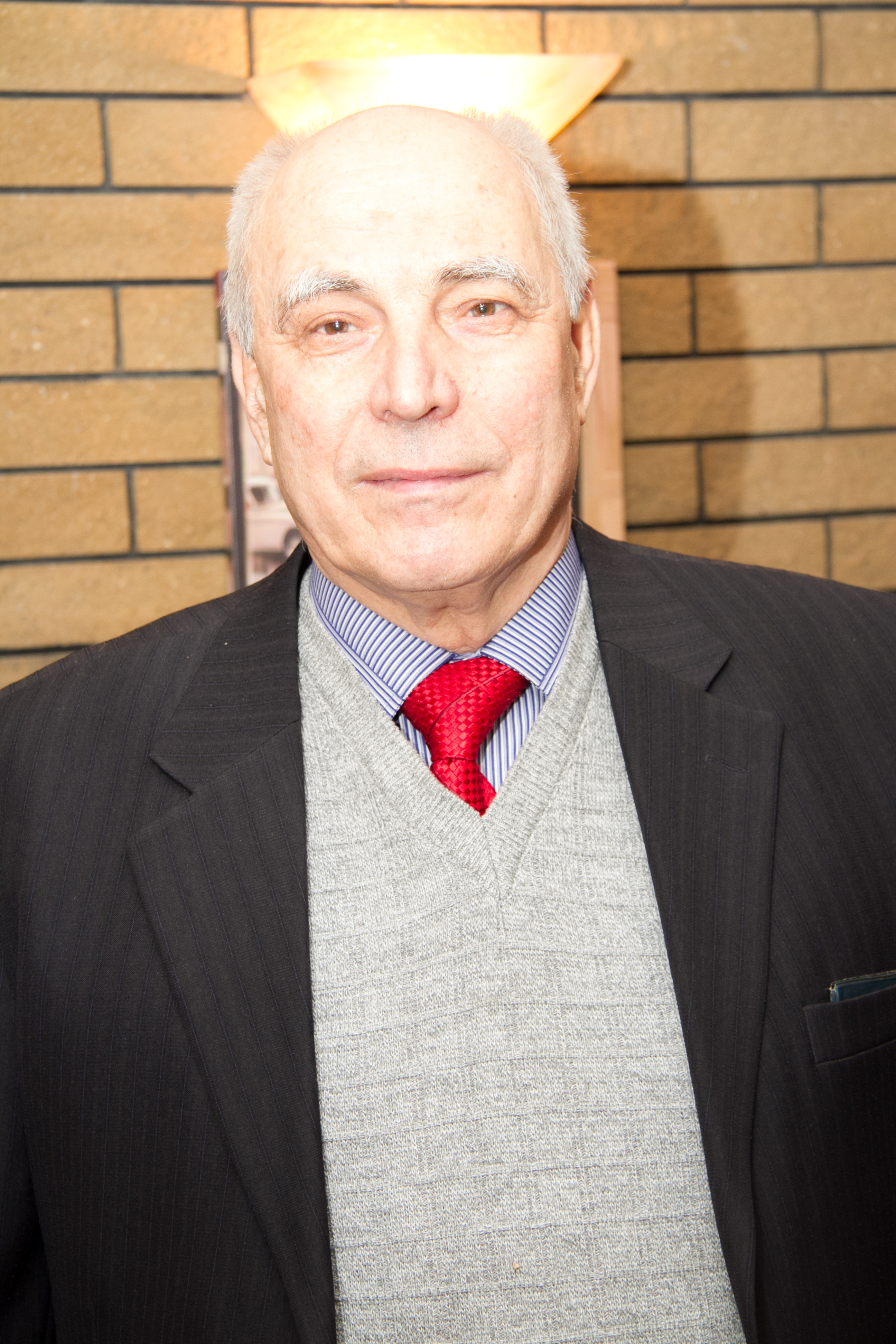 На новорічному засіданні кафедри філософії та соціології 2016 рік.